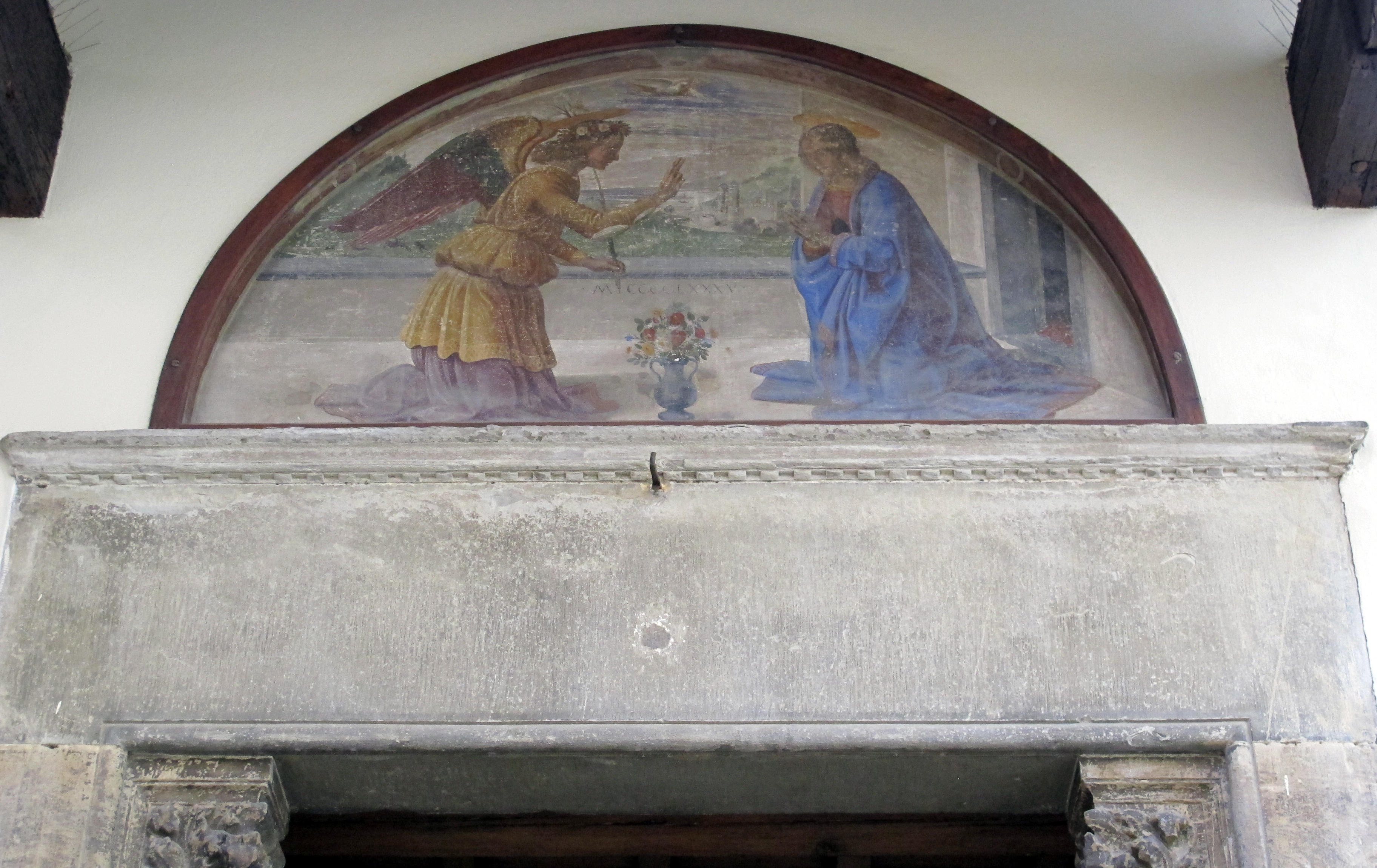 Via della Pergola, Firenze